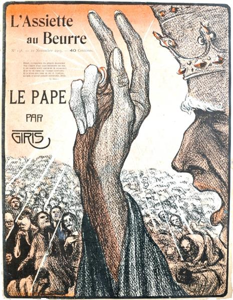 « Le Pape » [The Pope] by Giris in L'Assiette au beurre, 21 novembre 1903 issue 138.